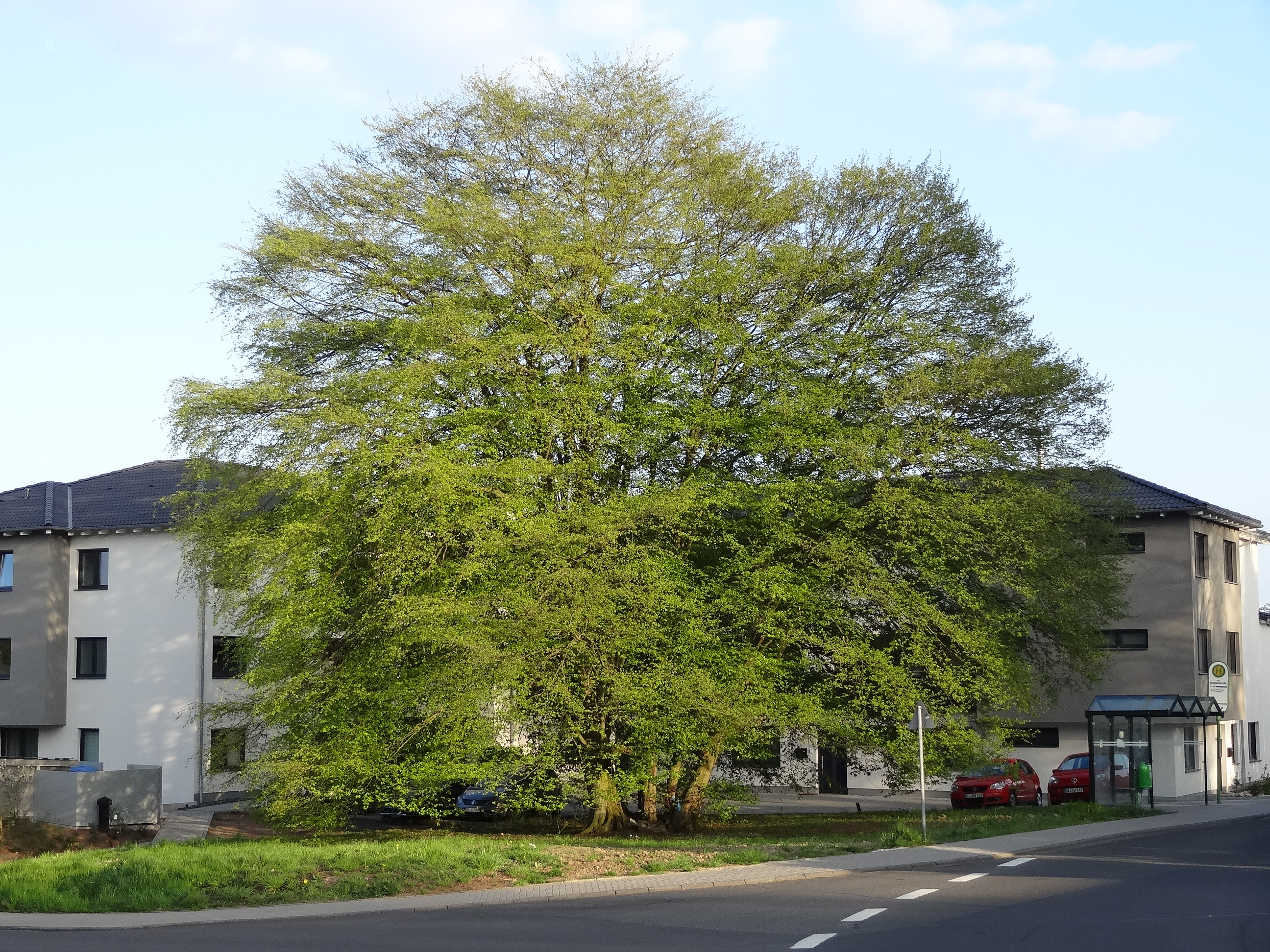 Nature of Lich